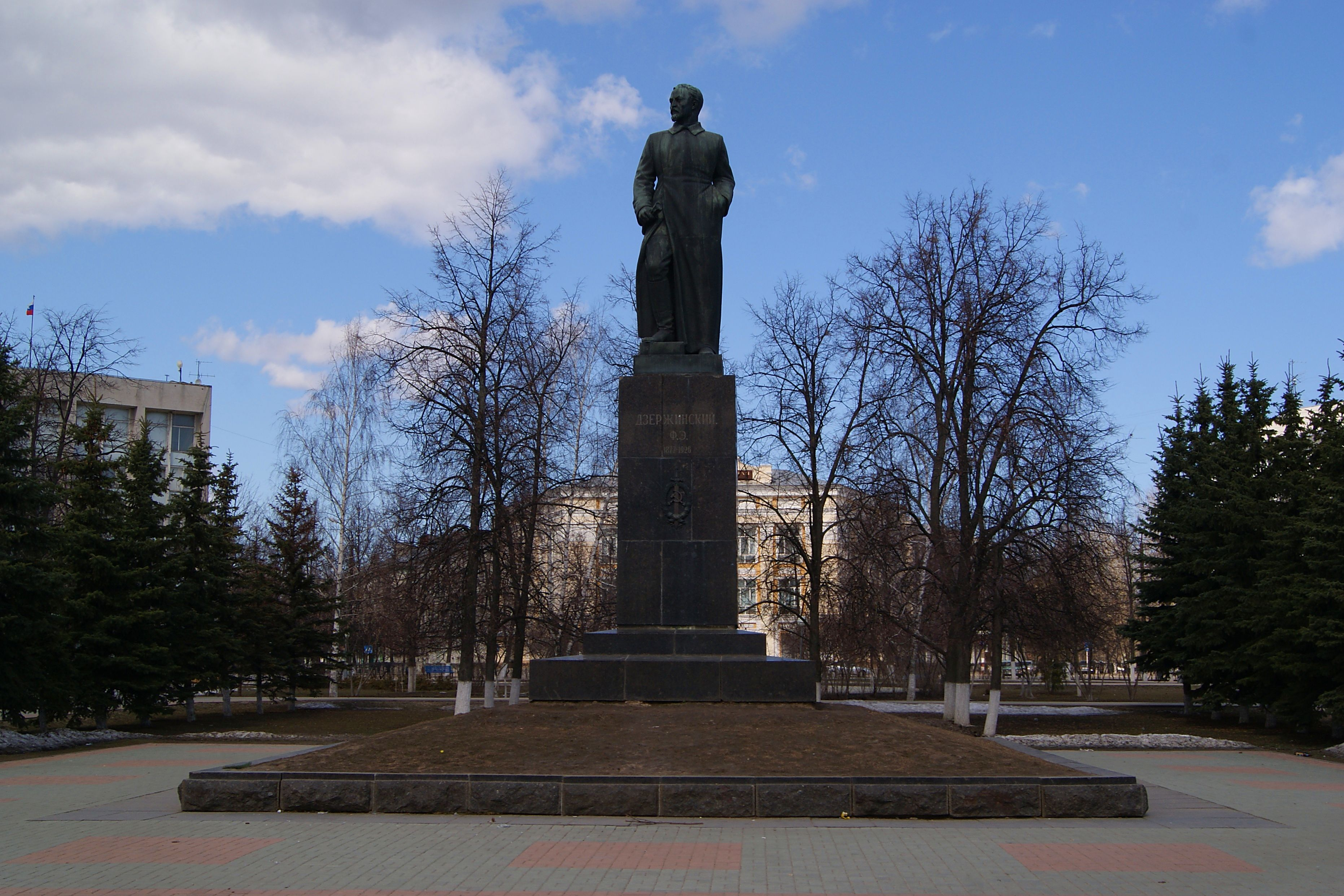 Дзержинск площадь